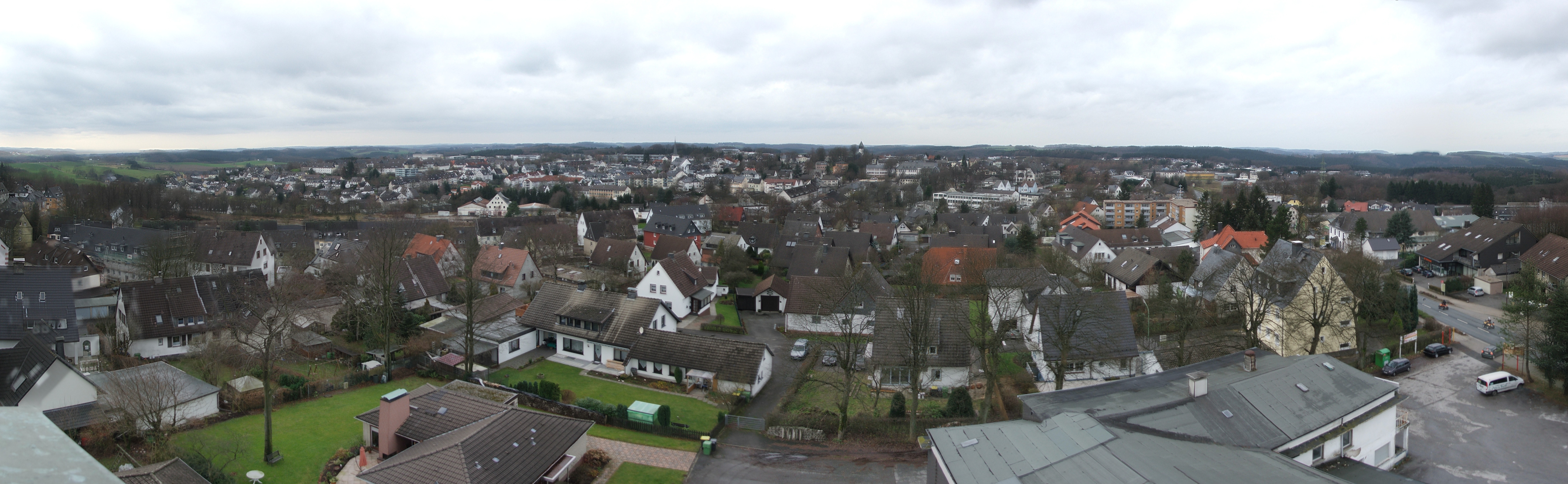 Halver im Sauerland vom Aussichtsturm Karlshöhe